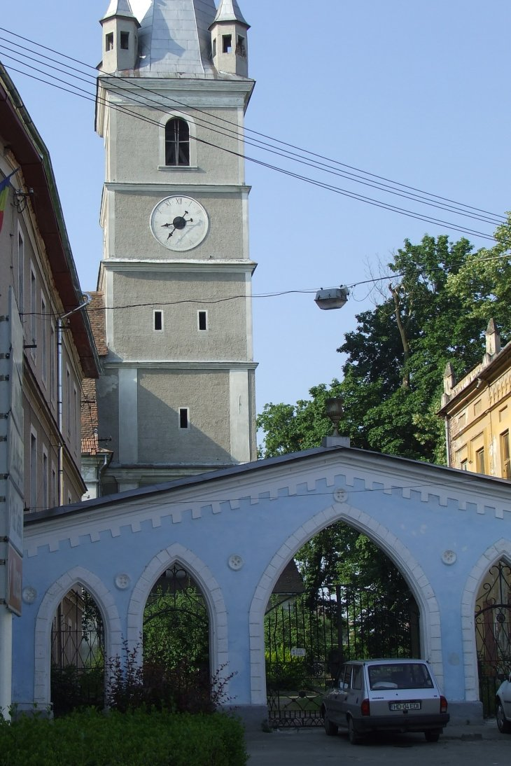 Image from Orăştie, Romania - Orăştie citadel